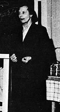 Elise Ottesen-Jensen, née le 2 janvier 1886 et morte le 4 septembre 1973, est une écrivaine, journaliste libertaire et féministe scandinave.